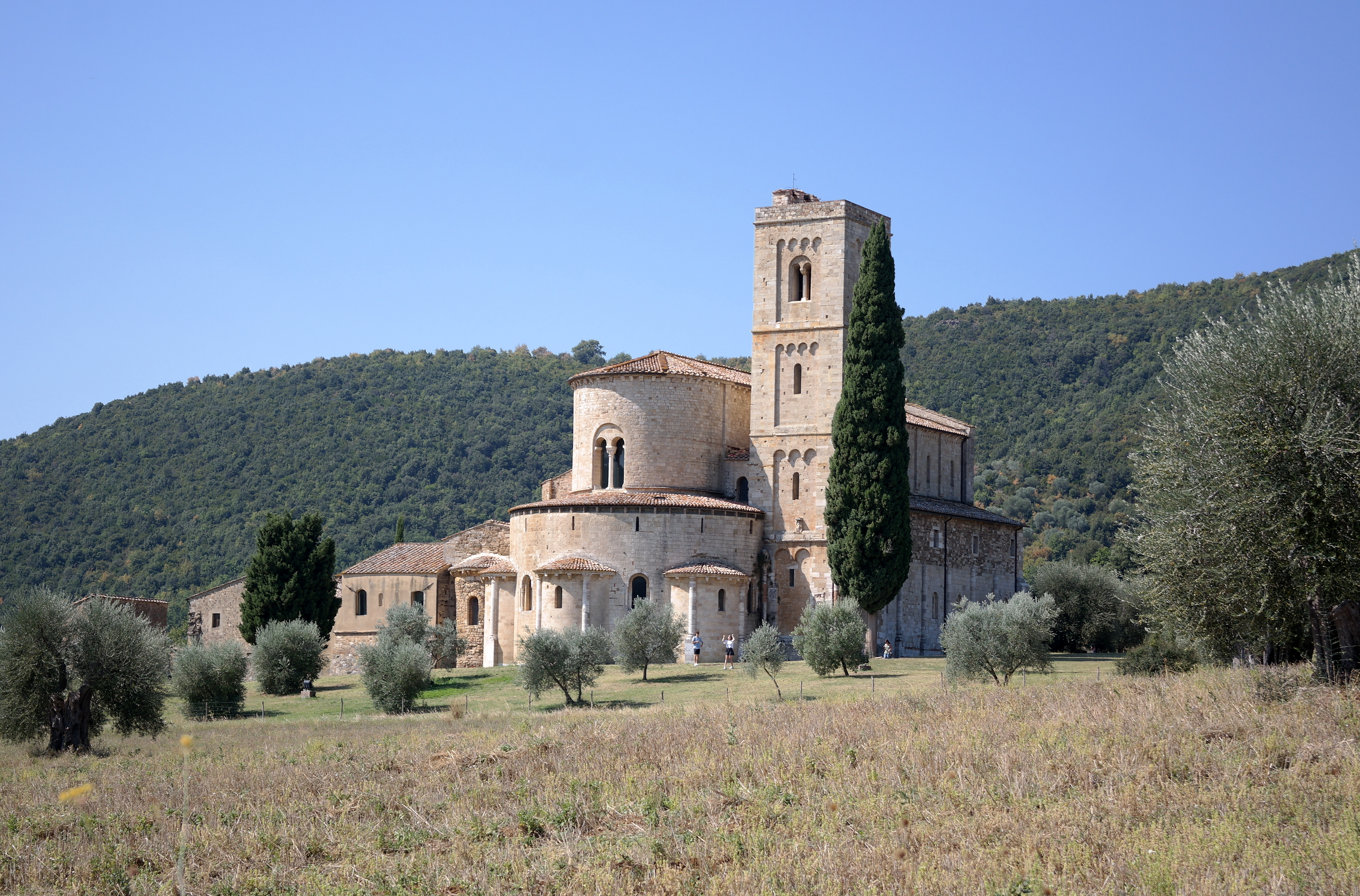 Retro dell'Abbazia di Sant'Antimo a Montalcino